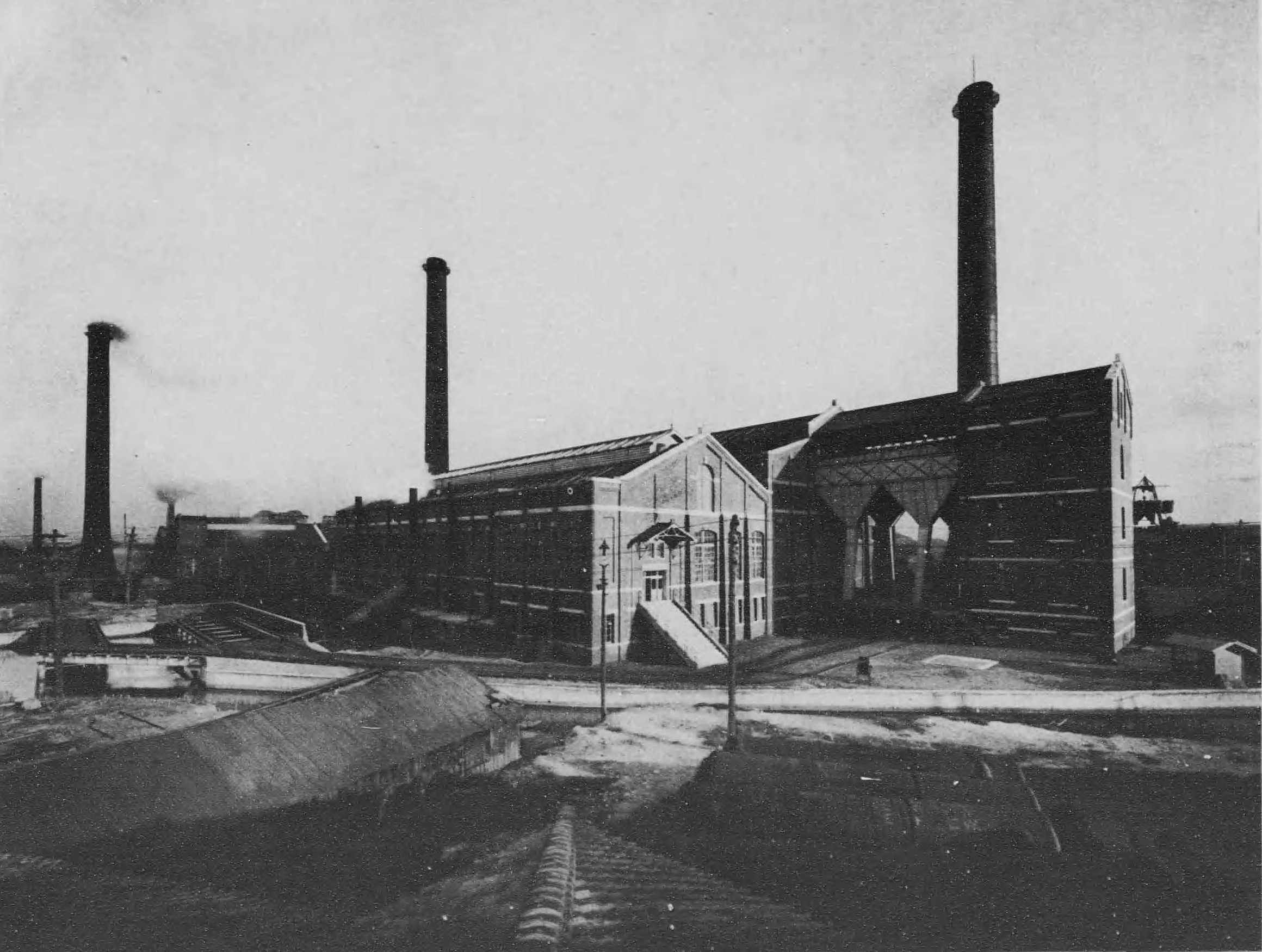 大阪電灯安治川西発電所（1911年竣工）